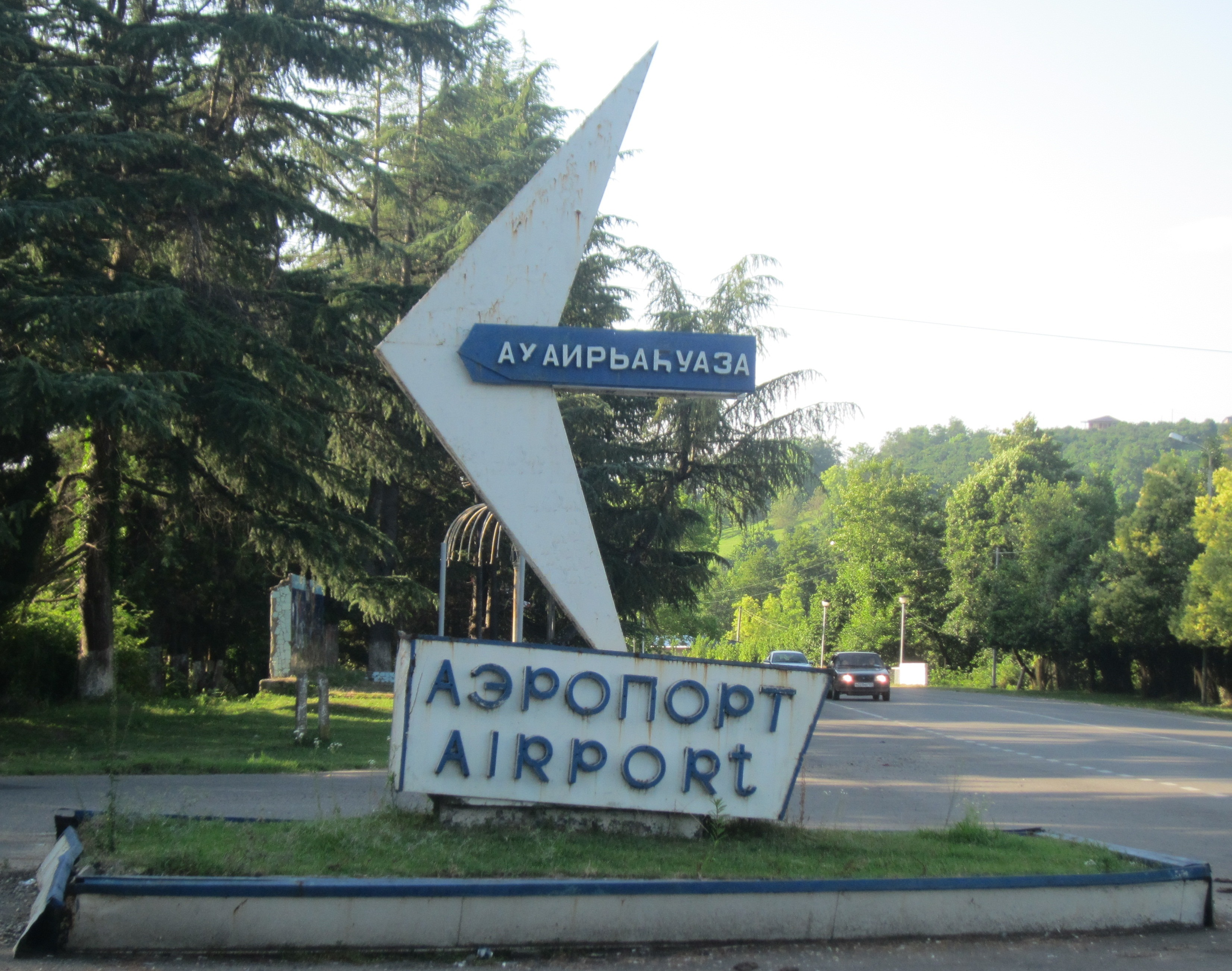 Дорожный указатель на аэропорт и село Бабушара (Гульрыпшский район). Установлен на Сухумском шоссе у съезда на бетонную дорогу (бетонку)